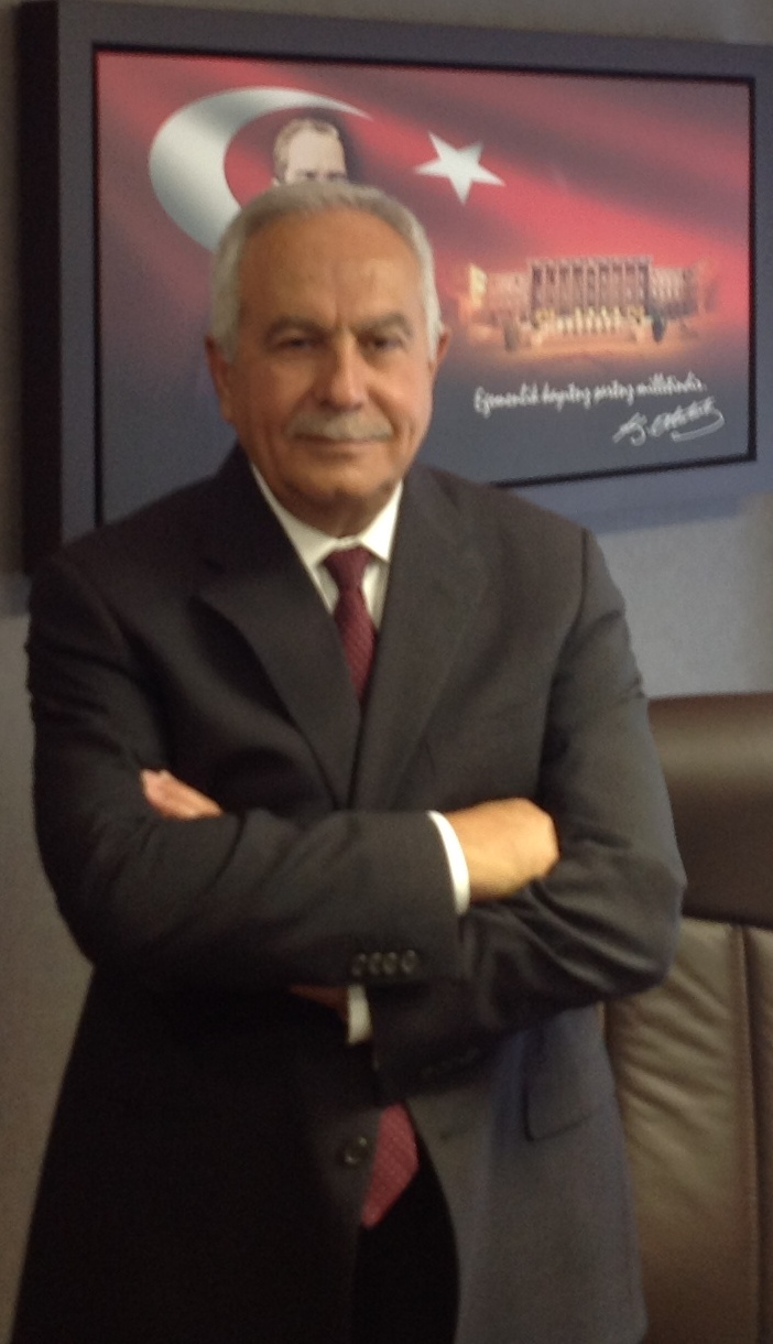 Murat Başesgioğlu